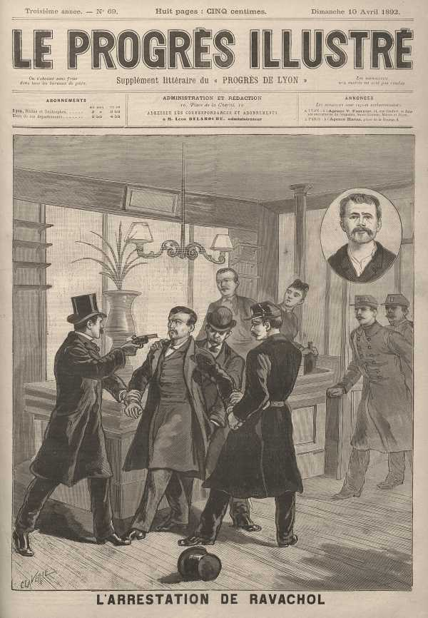 L'arrestation de Ravachol